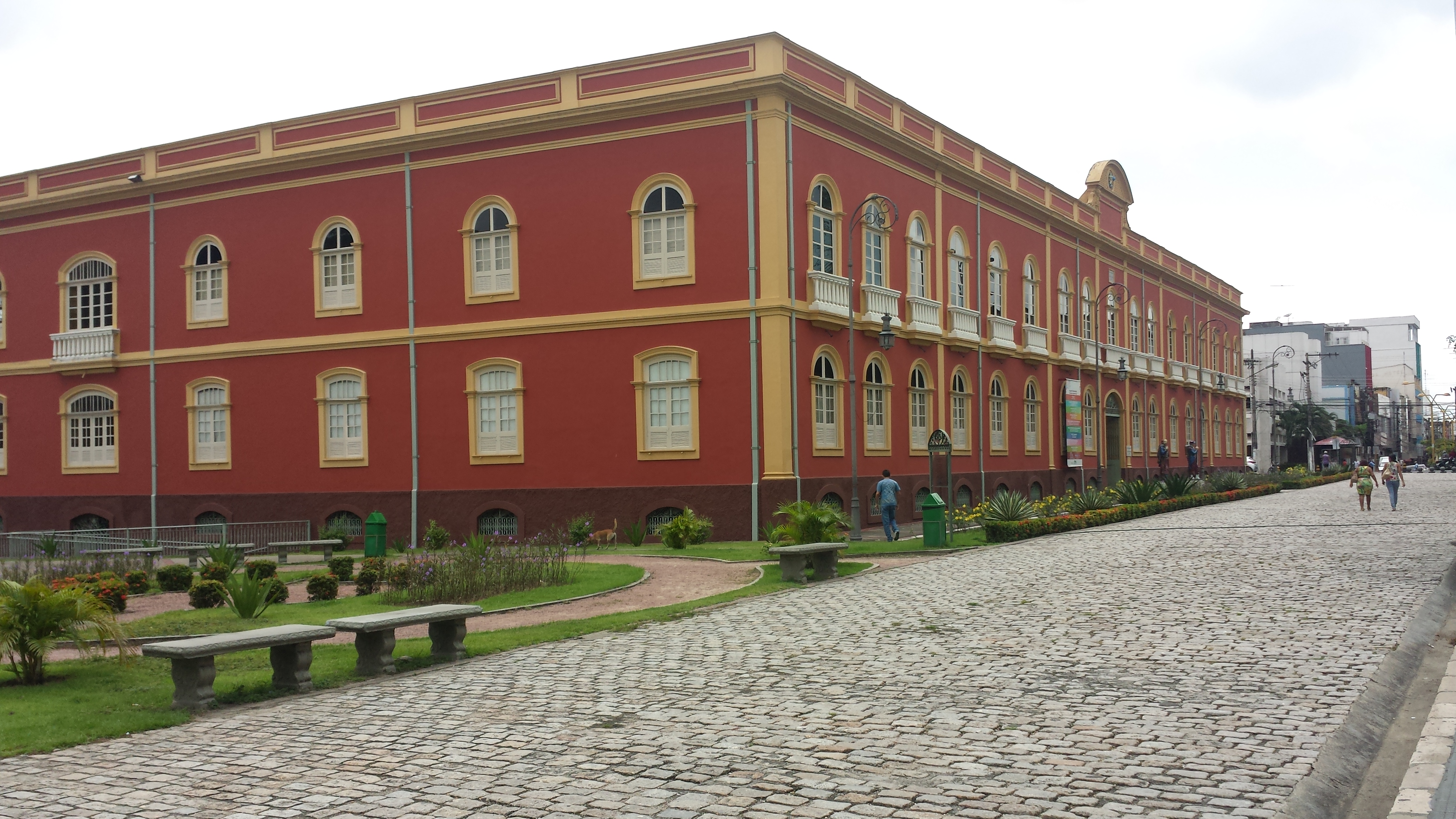 Centro Histórico de Manaus